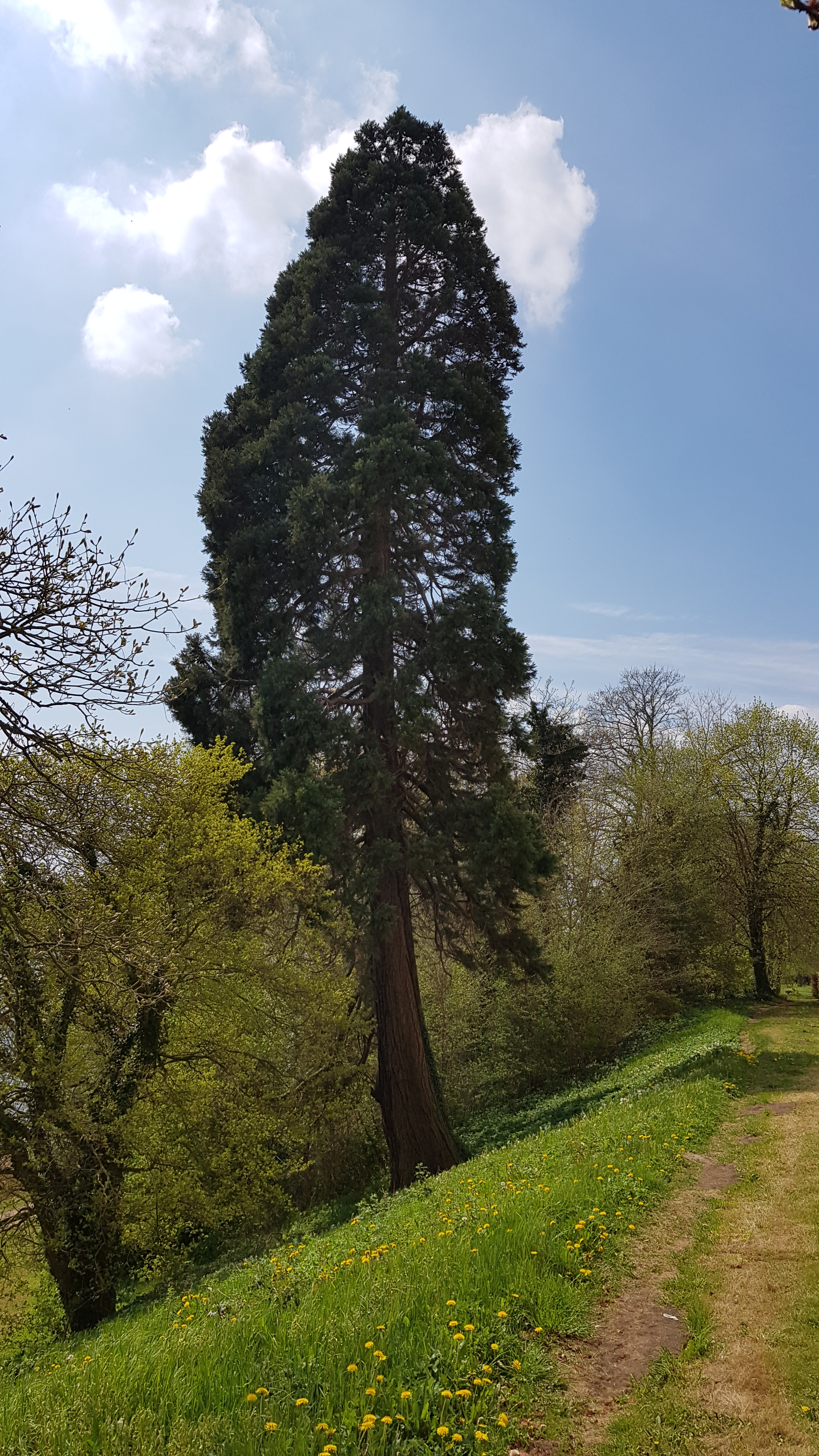 Mammuttræet ved Augustenborg Slot